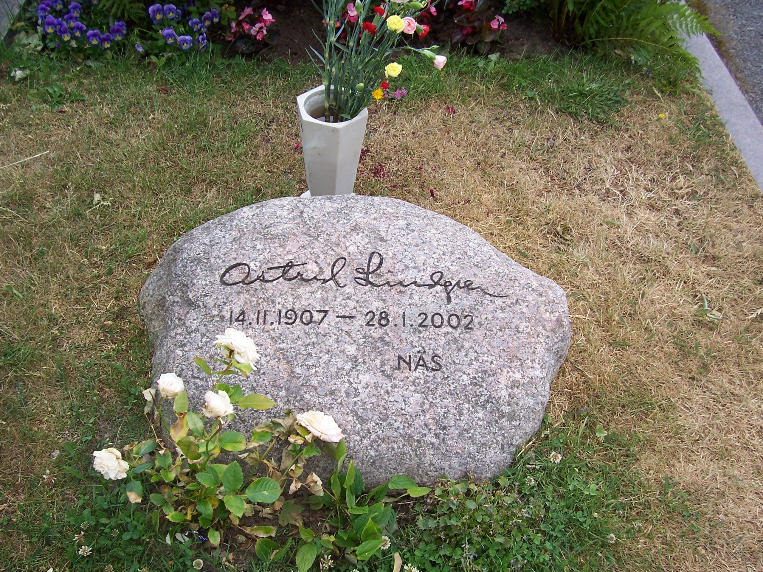 Astrid Lindgrens Grabstein